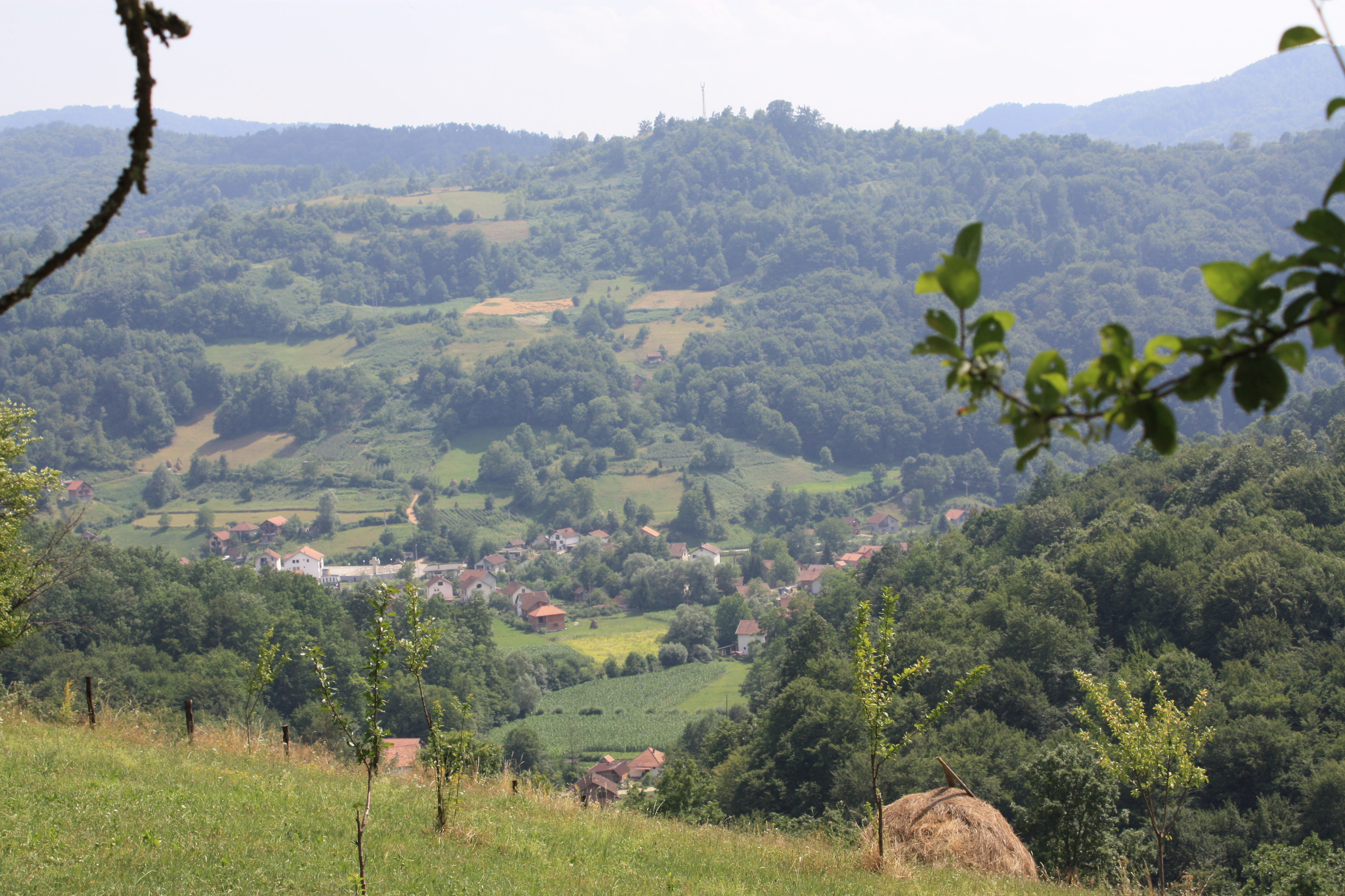 Kravička zelena dolina